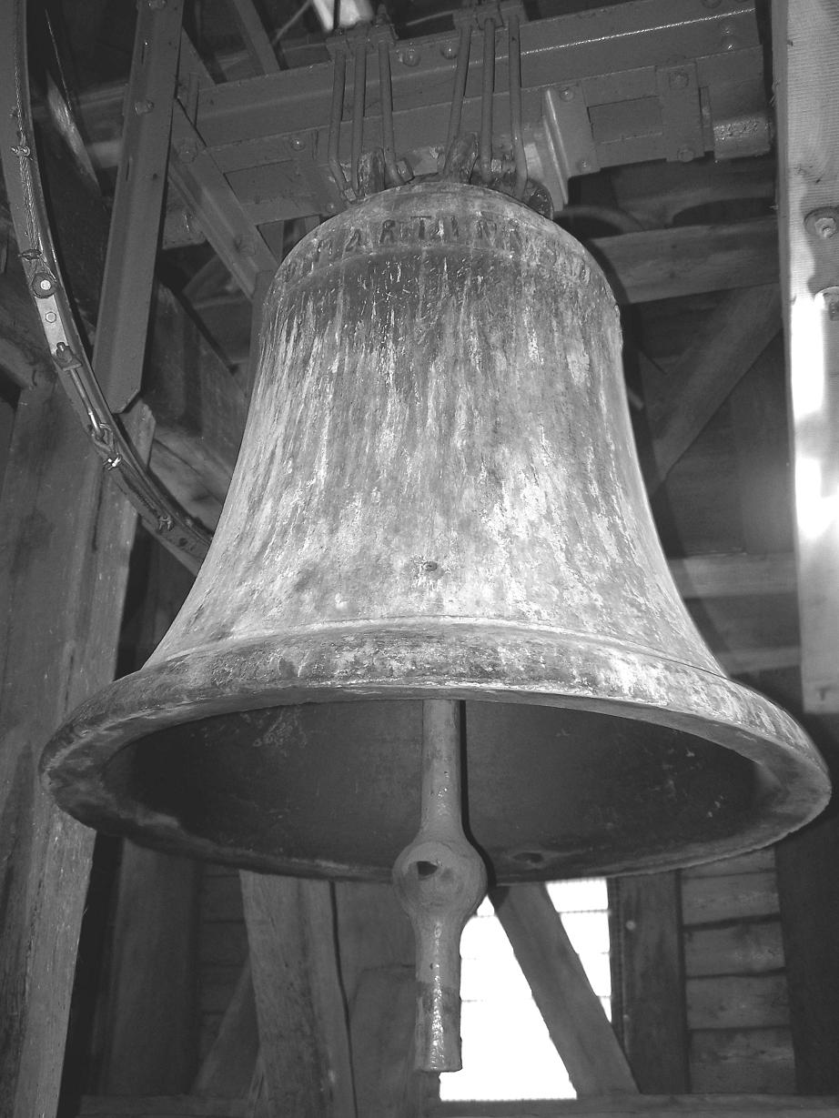 Glocke der Ober-Mockstädter Pfarrkirche